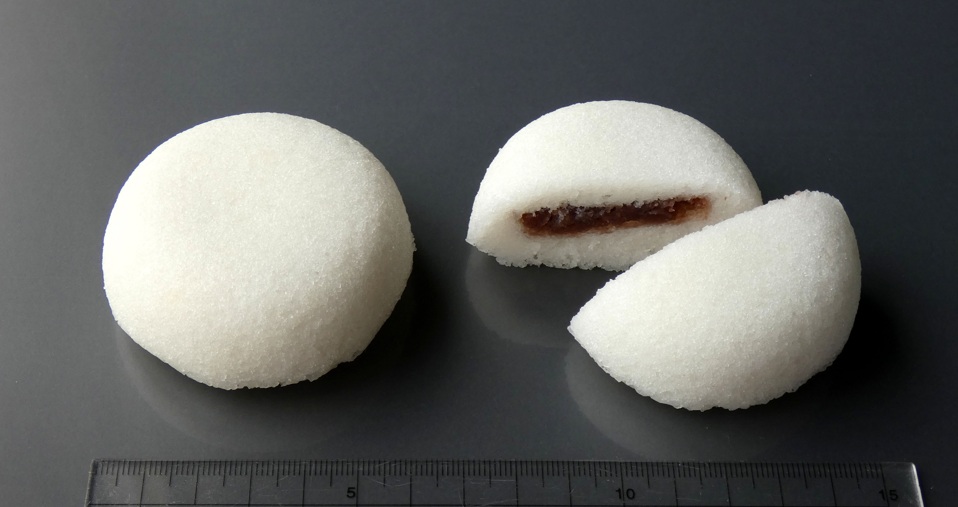 明石屋 かるかん饅頭